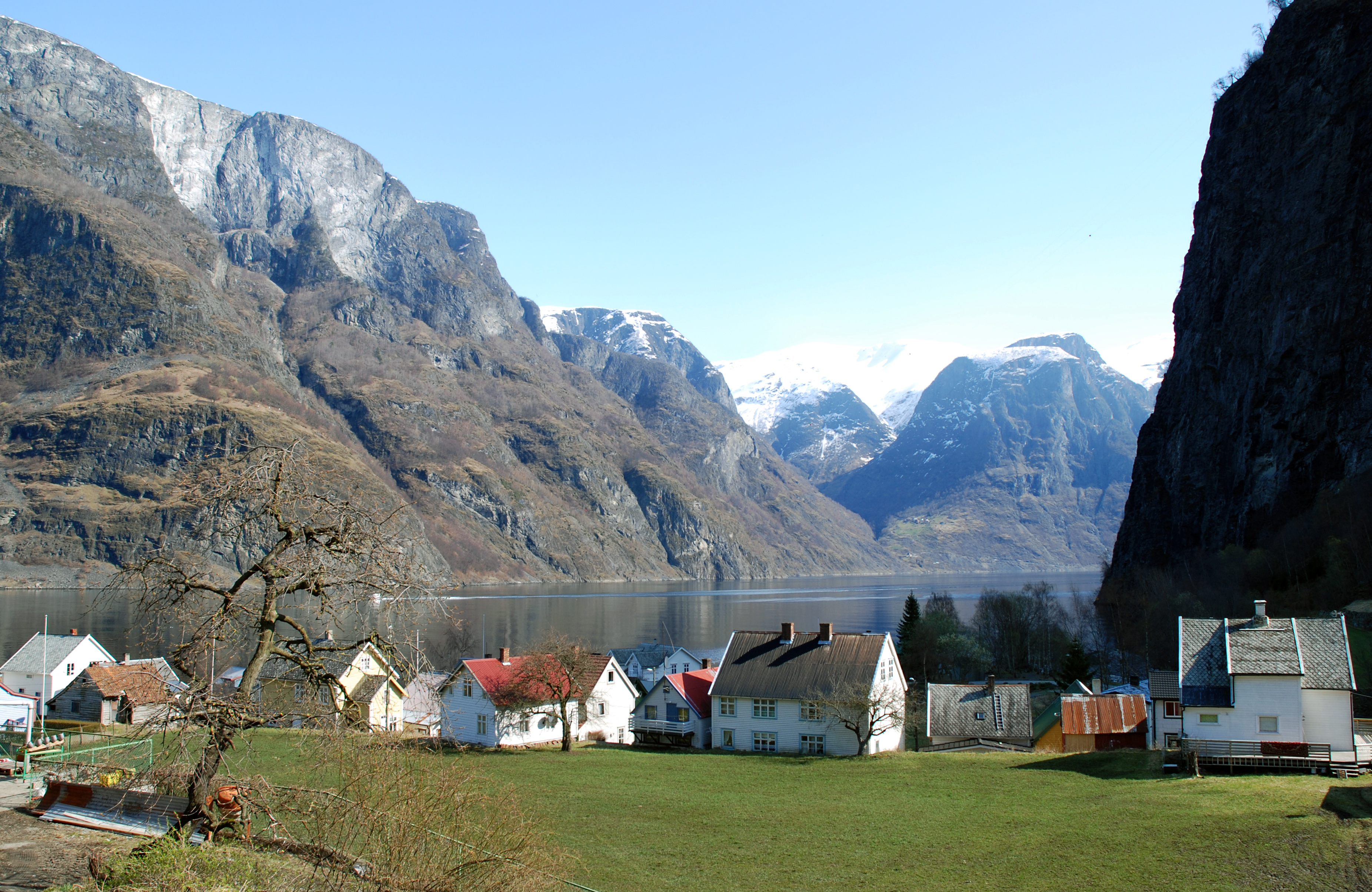 Undredal, in Aurland, Sogn og Fjordane, Norway.